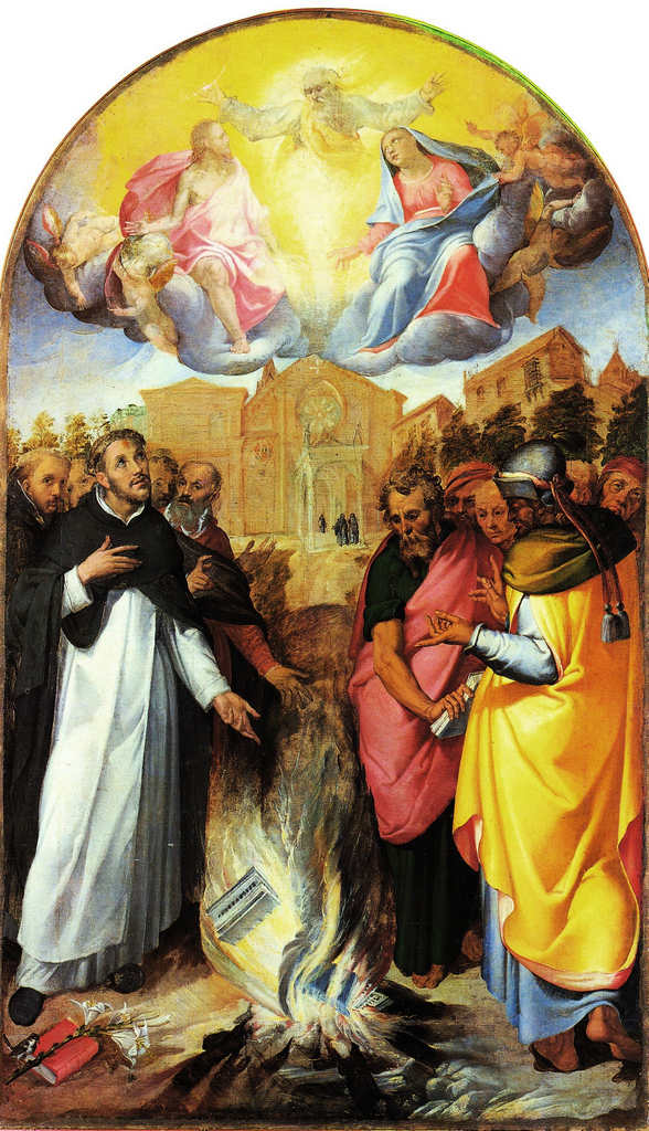 San Domenico e gli Albigesi